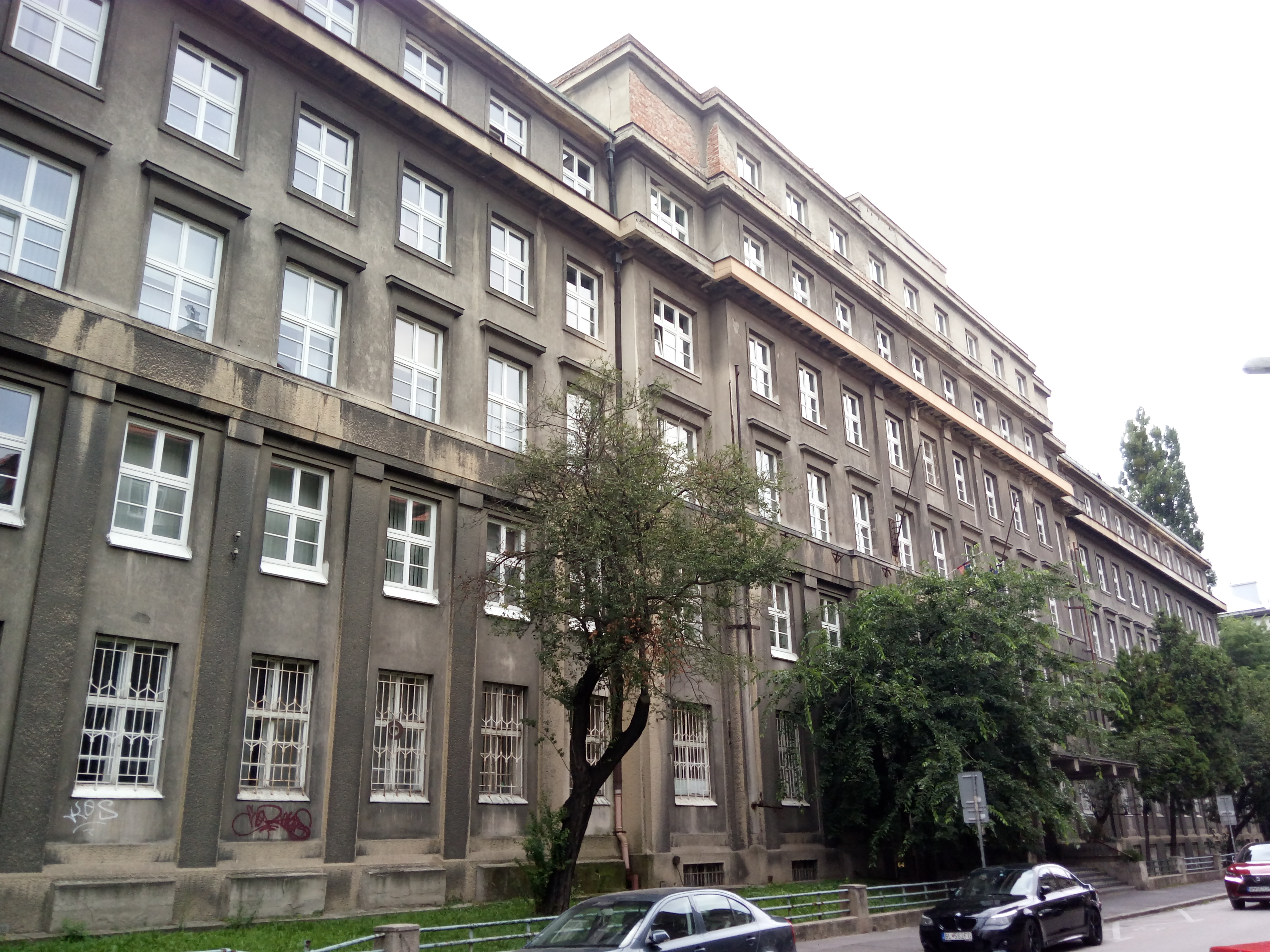 Klemensova, Staré Mesto, Bratislava